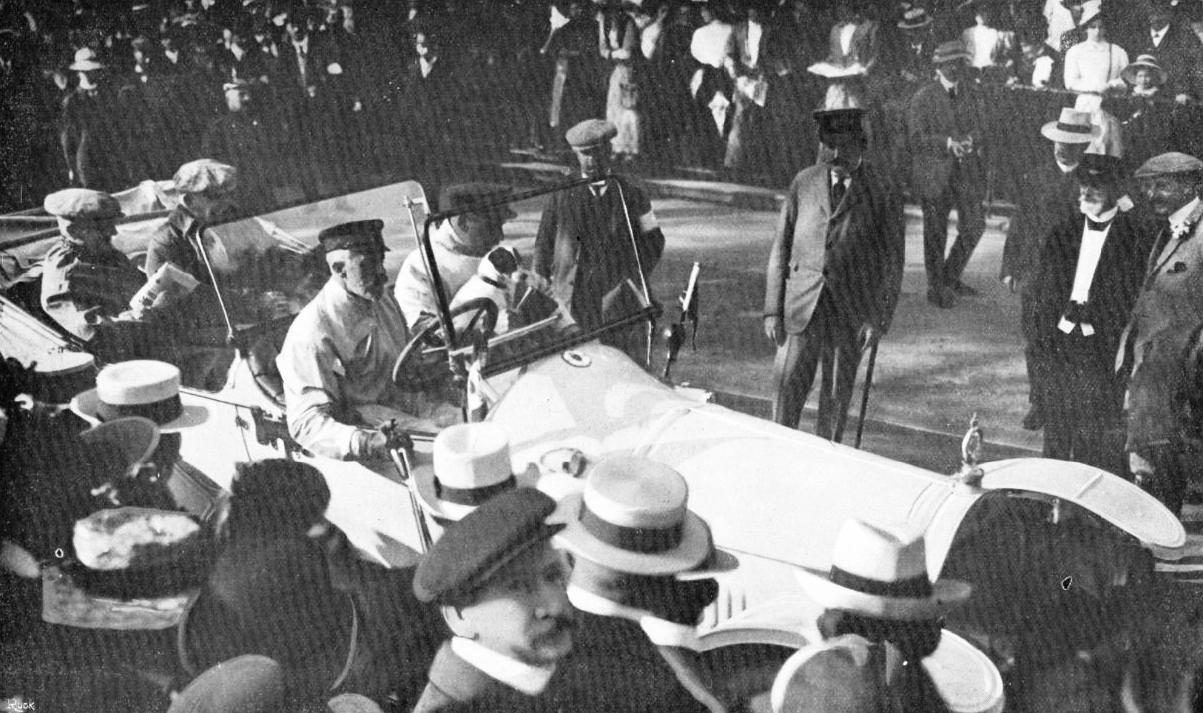 Prinz-Heinrich-Fahrt 1911, Prinz Heinrich zu beginn (in Homburg)